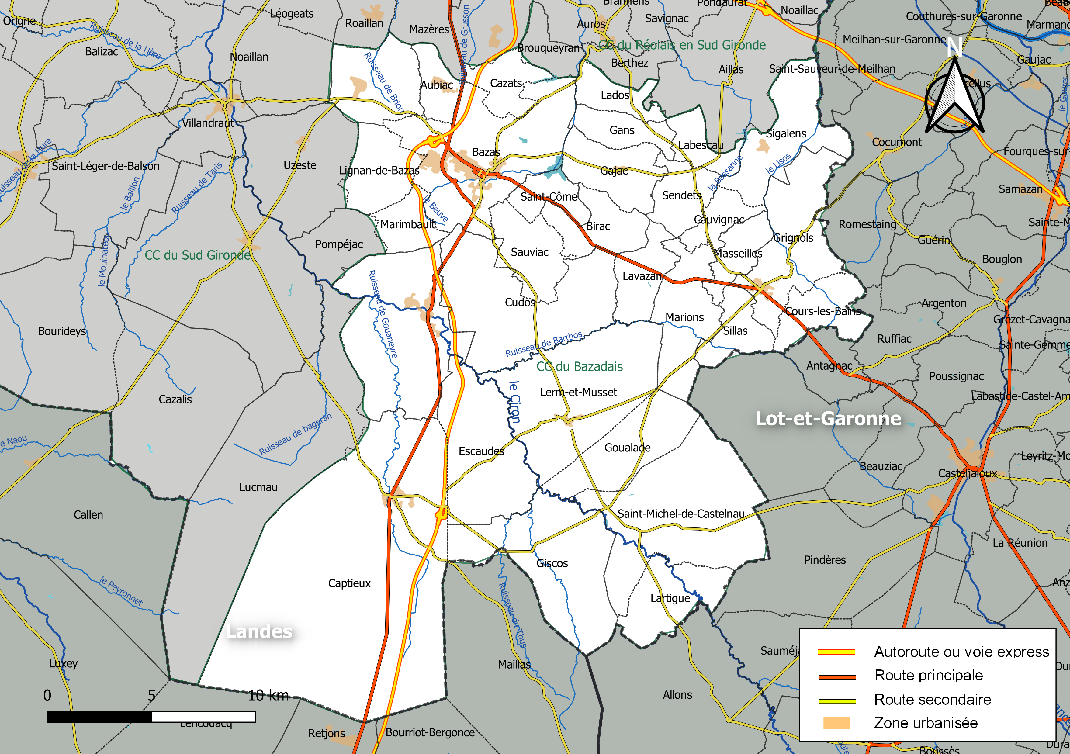 Carte géographique de la Communauté de communes du Bazadais, département de la Gironde, France. Composition au 1er janvier 2019.